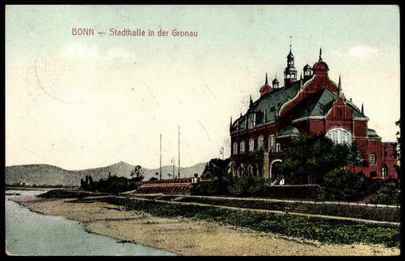 Stadthalle in der Gronau, Bonn: Postkarte, gelaufen 1912